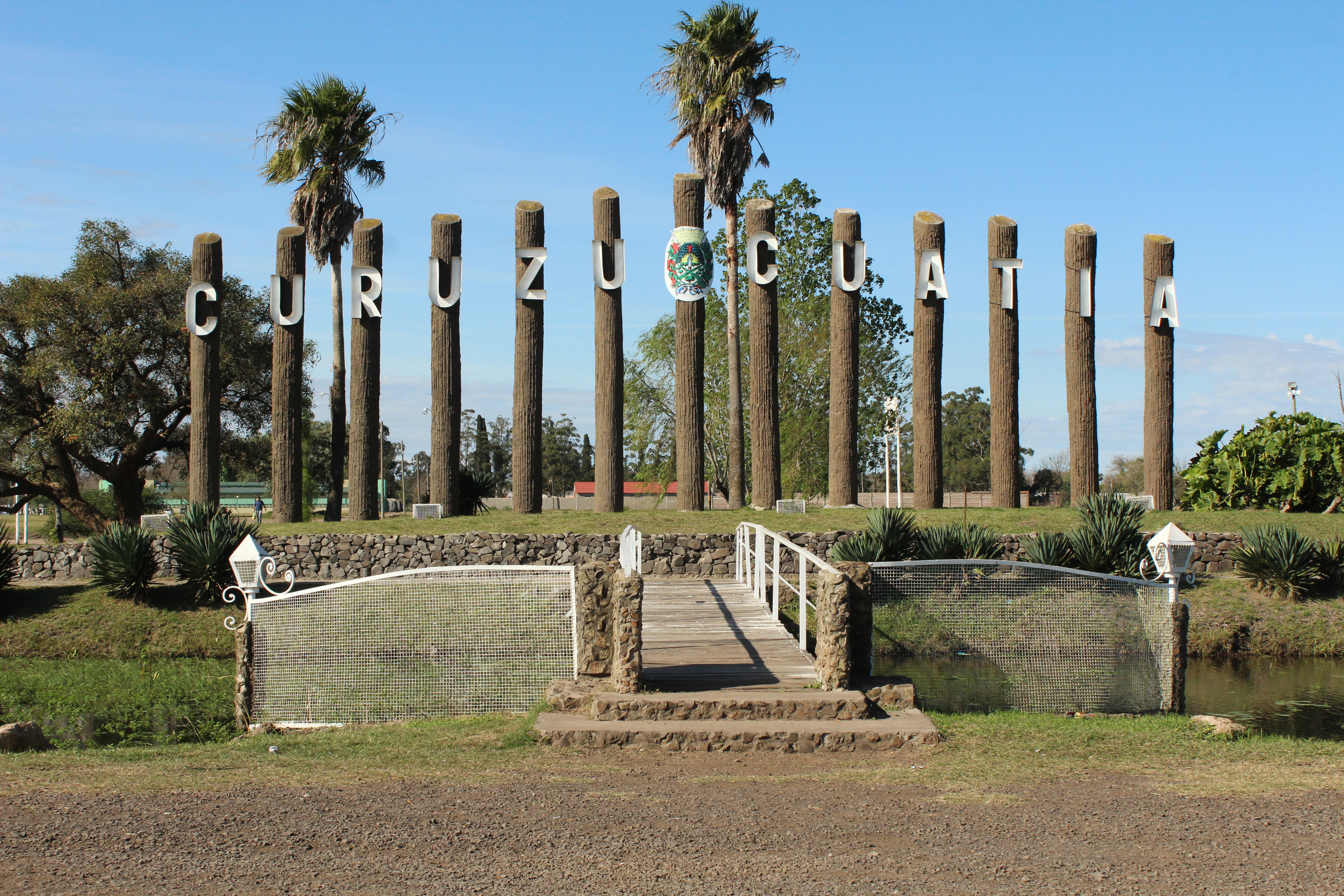 Entrada a la ciudad de Curuzú Cuatiá